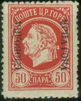 Невыпущенная марка Черногории 1916 года